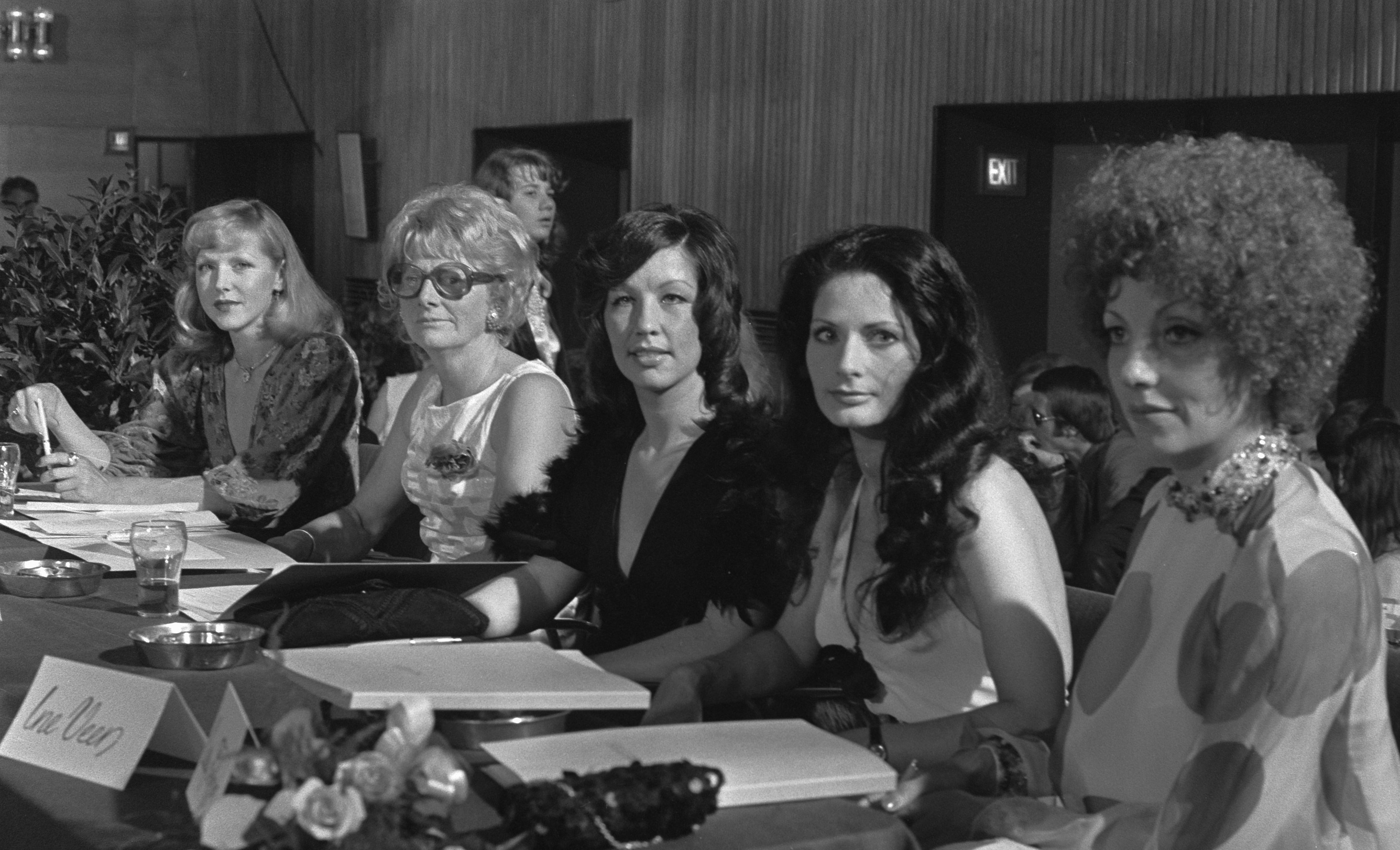 De jury van de Miss Amsterdamverkiezing bestaat uit vrouwen, v.l.n.r. Elly Koot, Fanny Blankers-Koen, Jeanette Sijnen, Ine Veen en Carry Tefsen